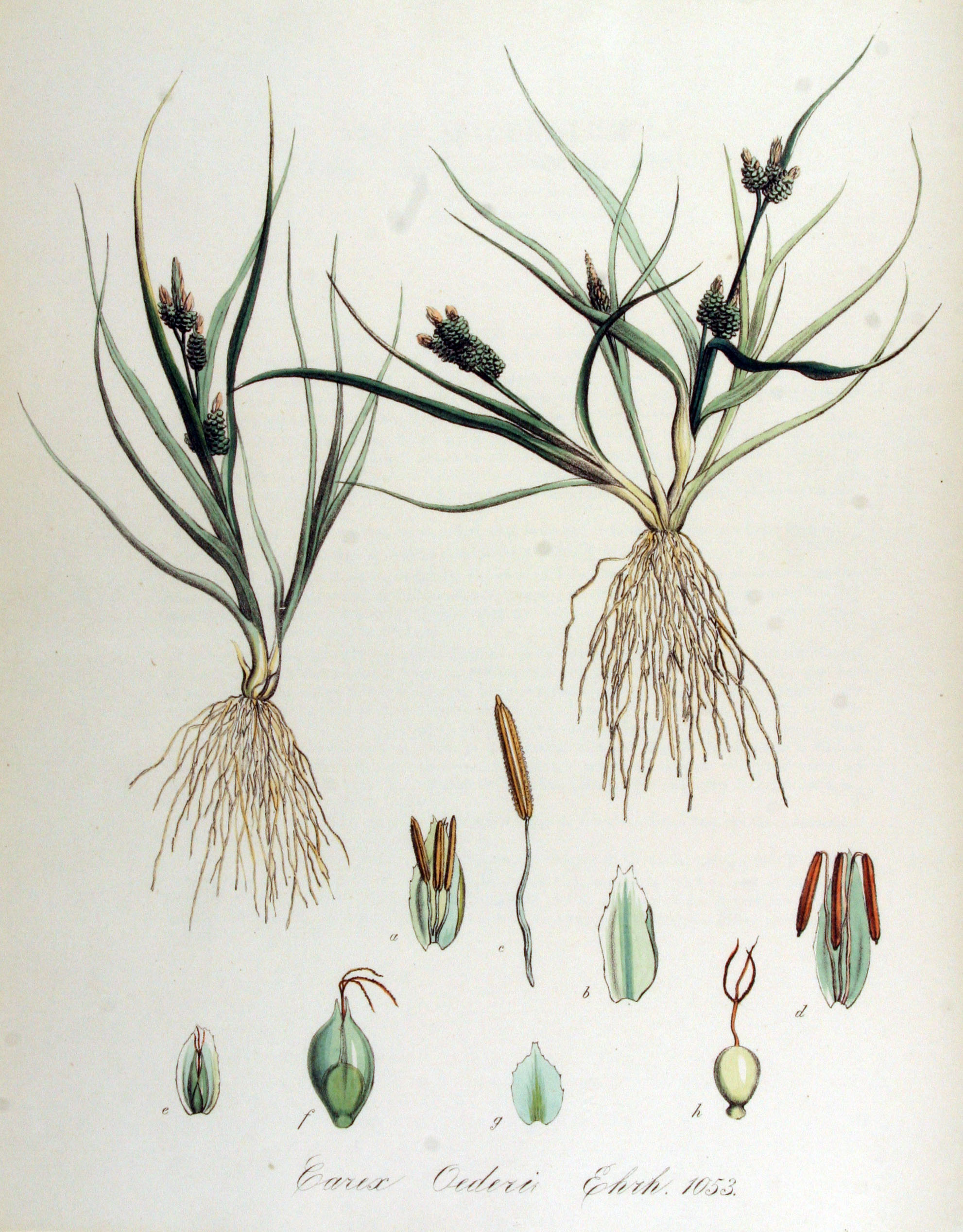 Carex demissa Vahl ex Hartm. (Syn. Carex oederi Retz.)